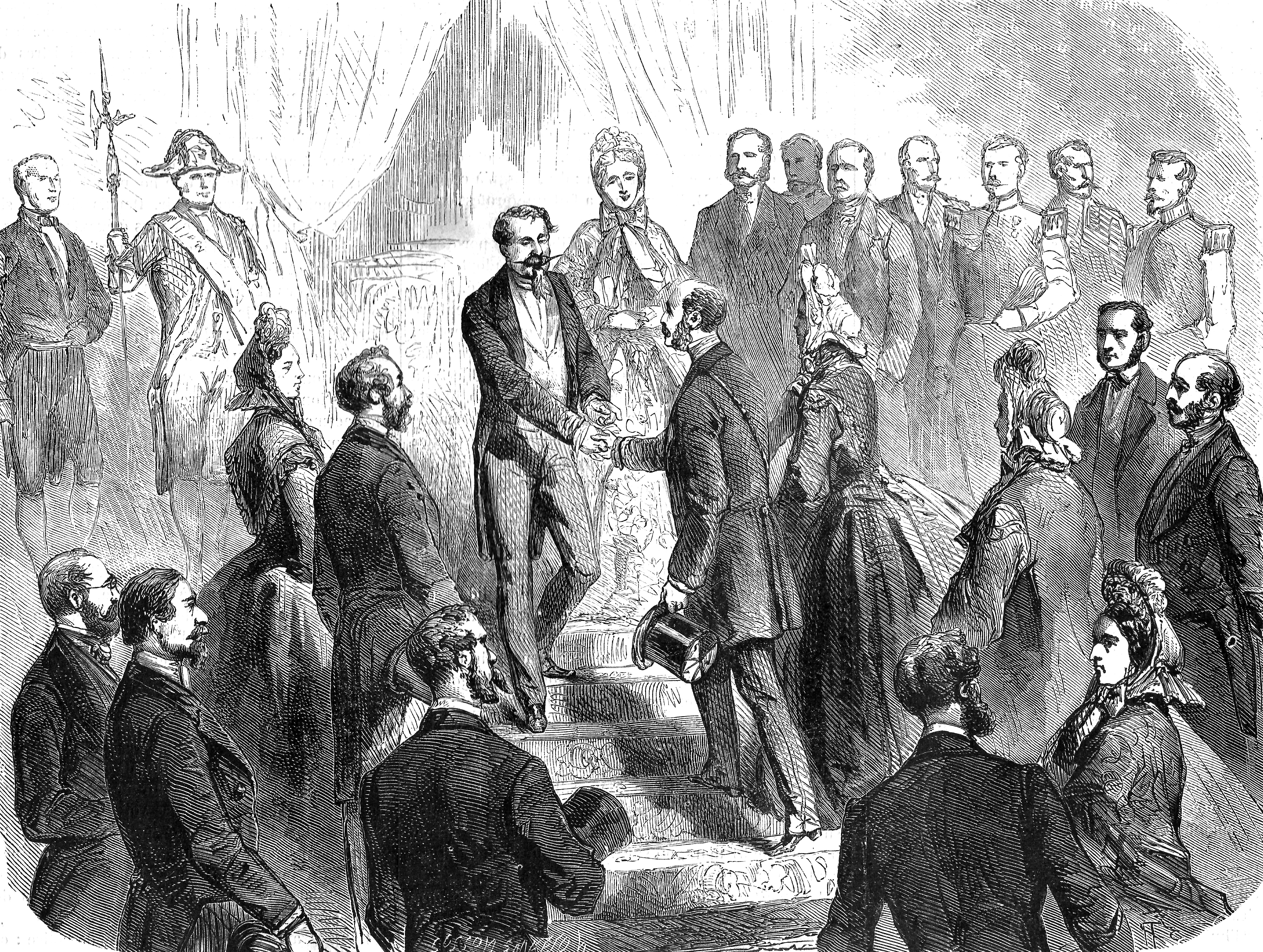 Visite de l’empereur Maximilien et de l’impératrice Charlotte du Mexique à l’empereur Napoléon III, palais des Tuileries (France), le 5 mars 1864. — L’empereur Napoléon III descend quelques marches pour accueillir Maximilien et Charlotte, tandis que l’impératrice Eugénie attend à la porte d’un salon. Durant une semaine, Maximilien aura des discussions avec Napoléon III concernant le Mexique, mais assistera aussi avec Charlotte à des spectacles, des concerts, des visites de musées, et participera même à une classique chasse à Versailles.